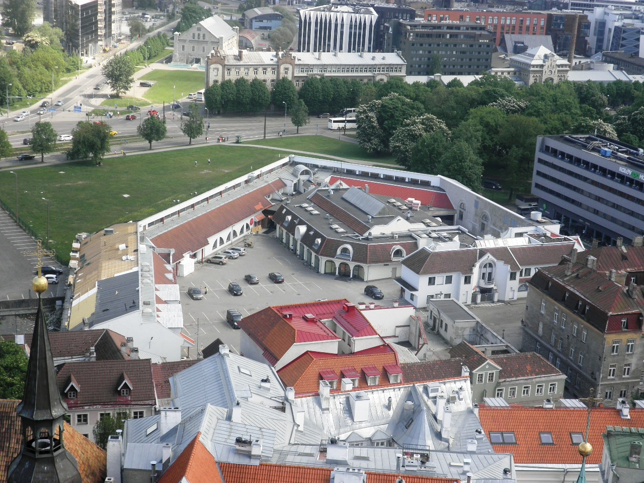 Aia 20 hoonetekompleks Tallinnas Väikese Rannavärava bastioni taastatud kivikonstruktsioonide vahel. Vaade Oleviste kiriku tornist.